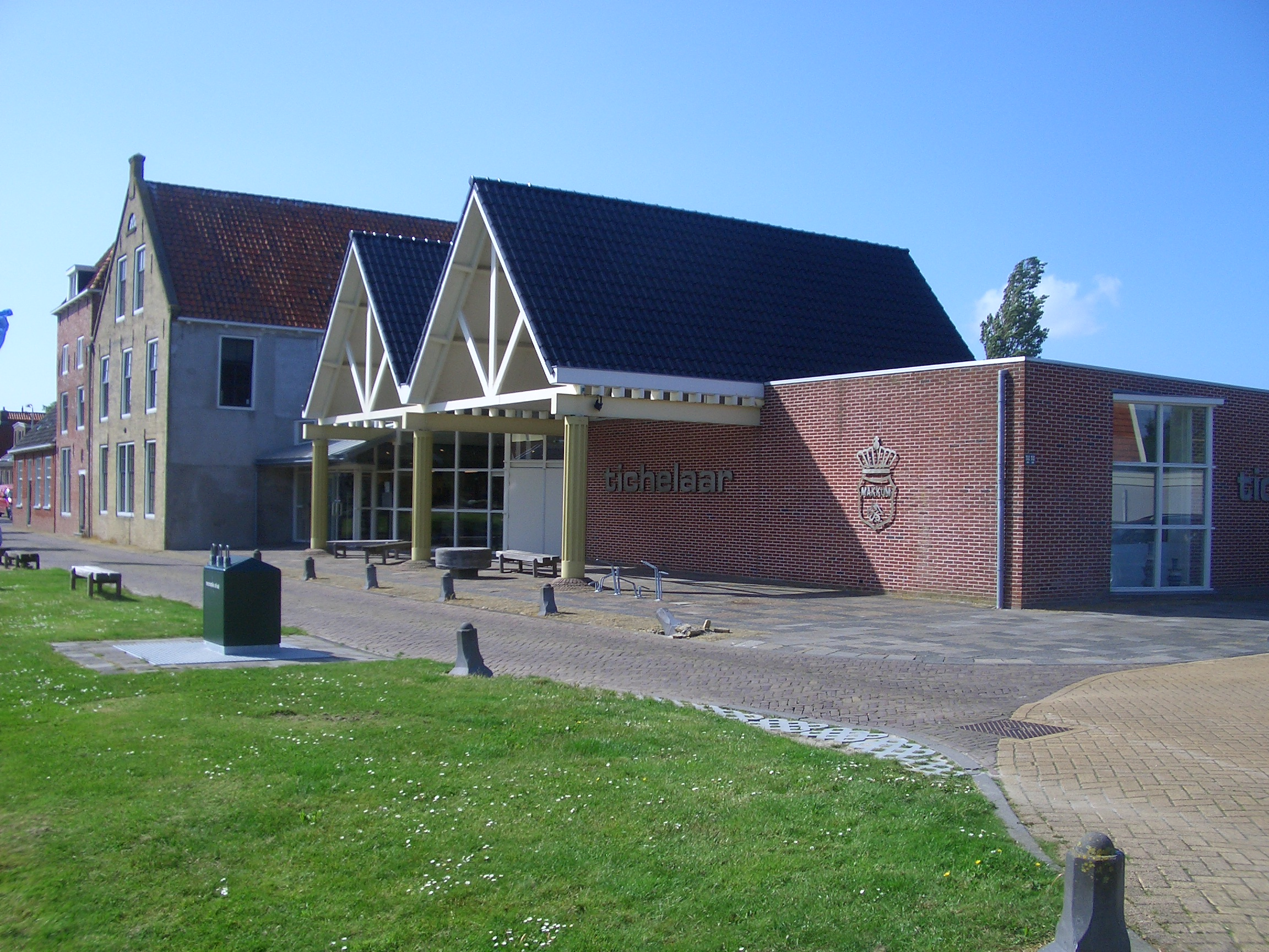 Aardewerkbedrijf Koninklijke Tichelaar in Makkum